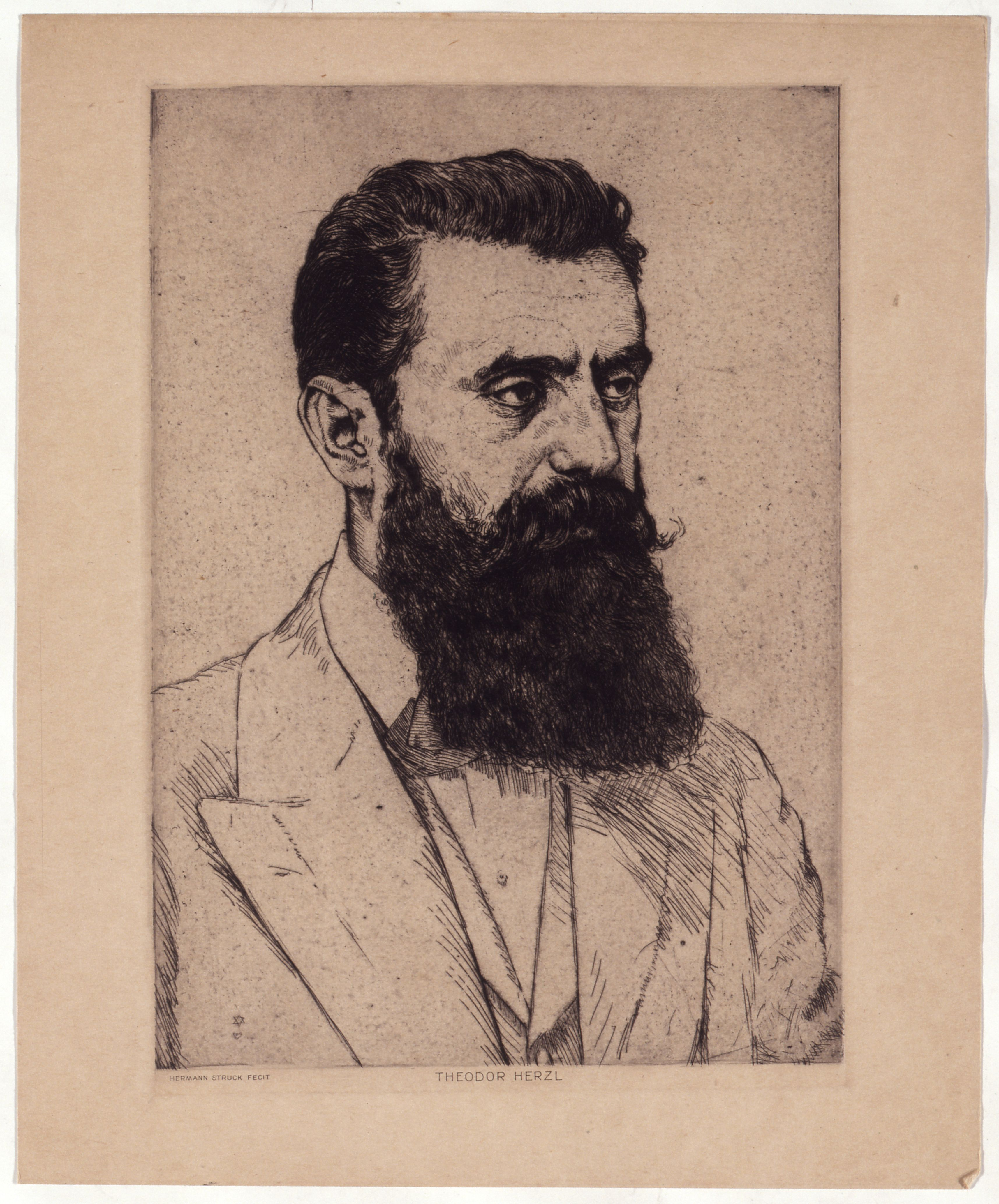 Artwork by Hermann Struck Dargestellte Person: Herzl, Theodor (1860 - 1904), DNB-Link Datierung Display: ca. 1920 - 1930 Objektart: Radierung Schlagworte Inhalt /Geografie: Mann, Porträt, Kleidung Schlagworte Kontext: Politiker, Zionist, Zionismus